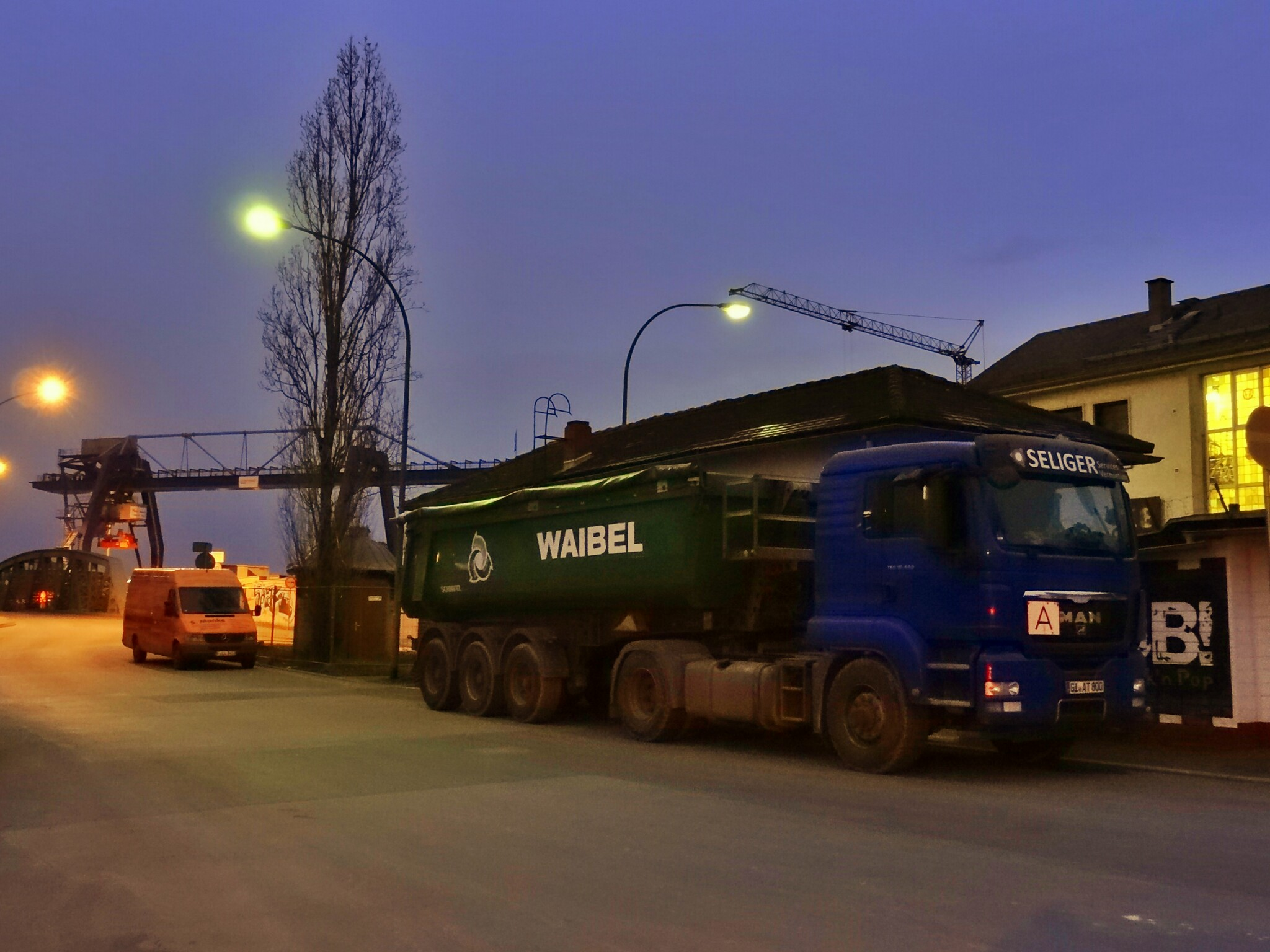 Ffm old industrial Eastend at weekend by night...